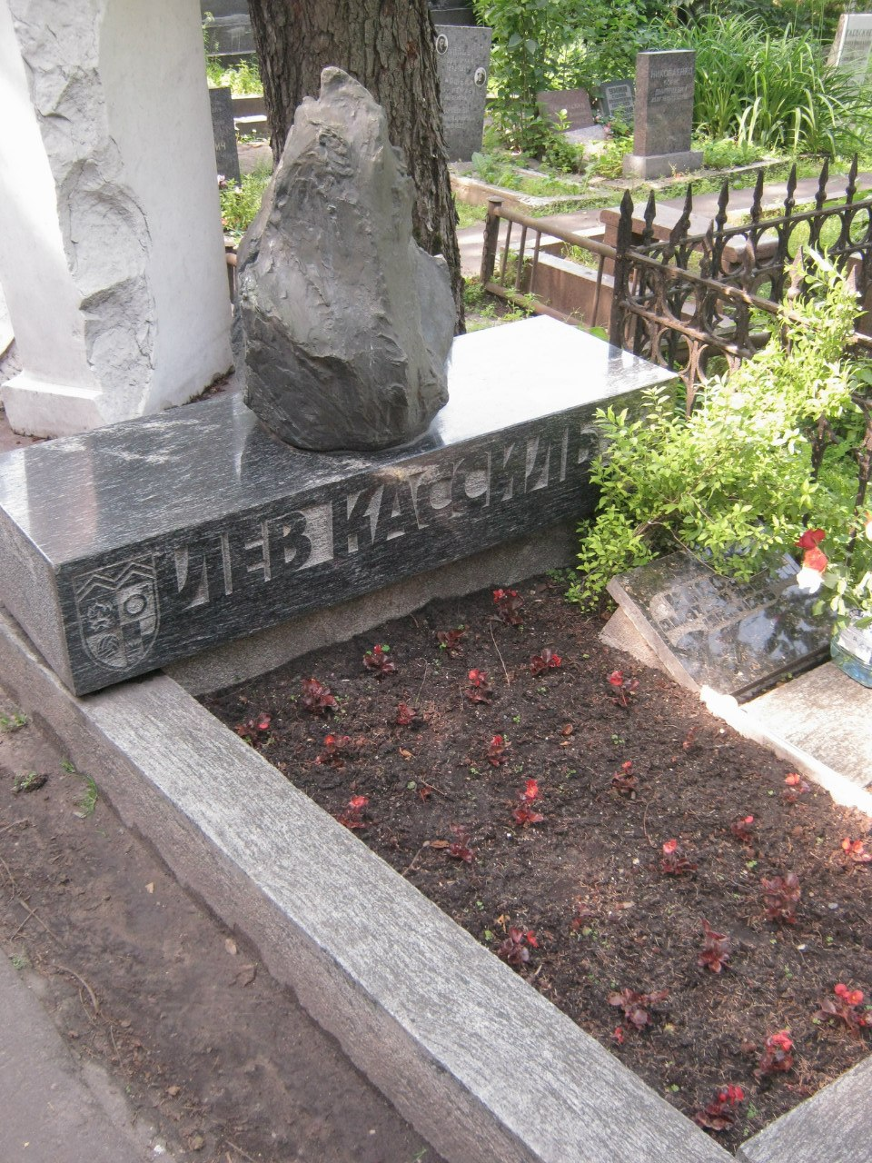 Могила Кассиля Льва Абрамовича (1906-1970), писателя: Новодевичье кладбище, Хамовники, Центральный округ, Москва